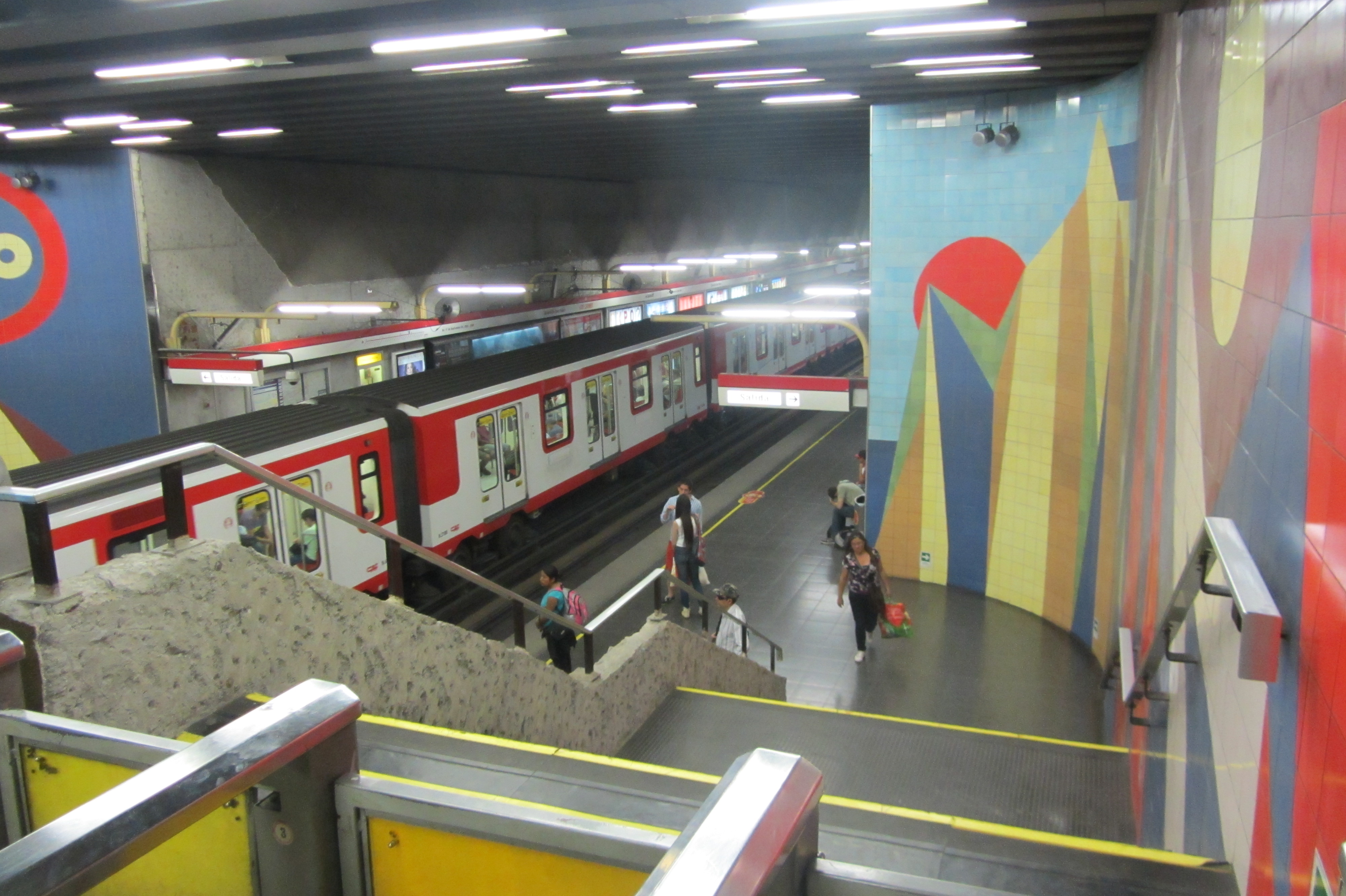 Los Leones metro station, Santiago, Chile.